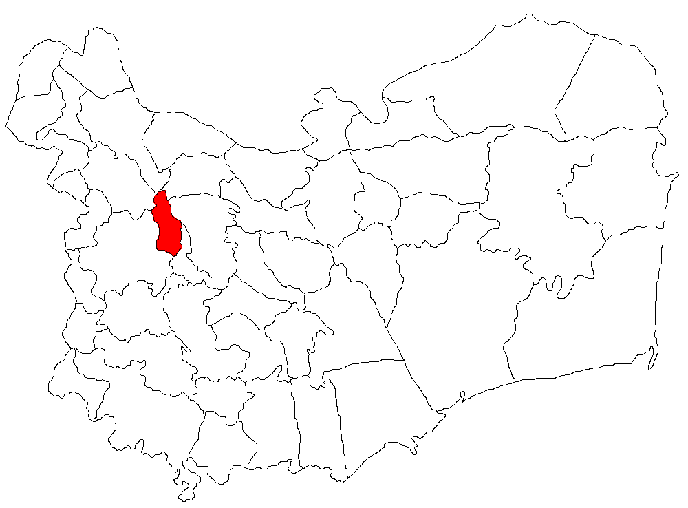 Categorie:Hărţi ale judeţului Tulcea